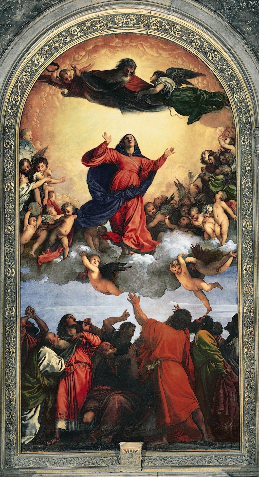 Hochaltar für St. Maria Gloriosa dei Frari in Venedig